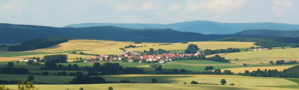 Blick von der Straße Friedelshausen-Kaltenlengsfeld auf Hümpfershausen (gezoomt)